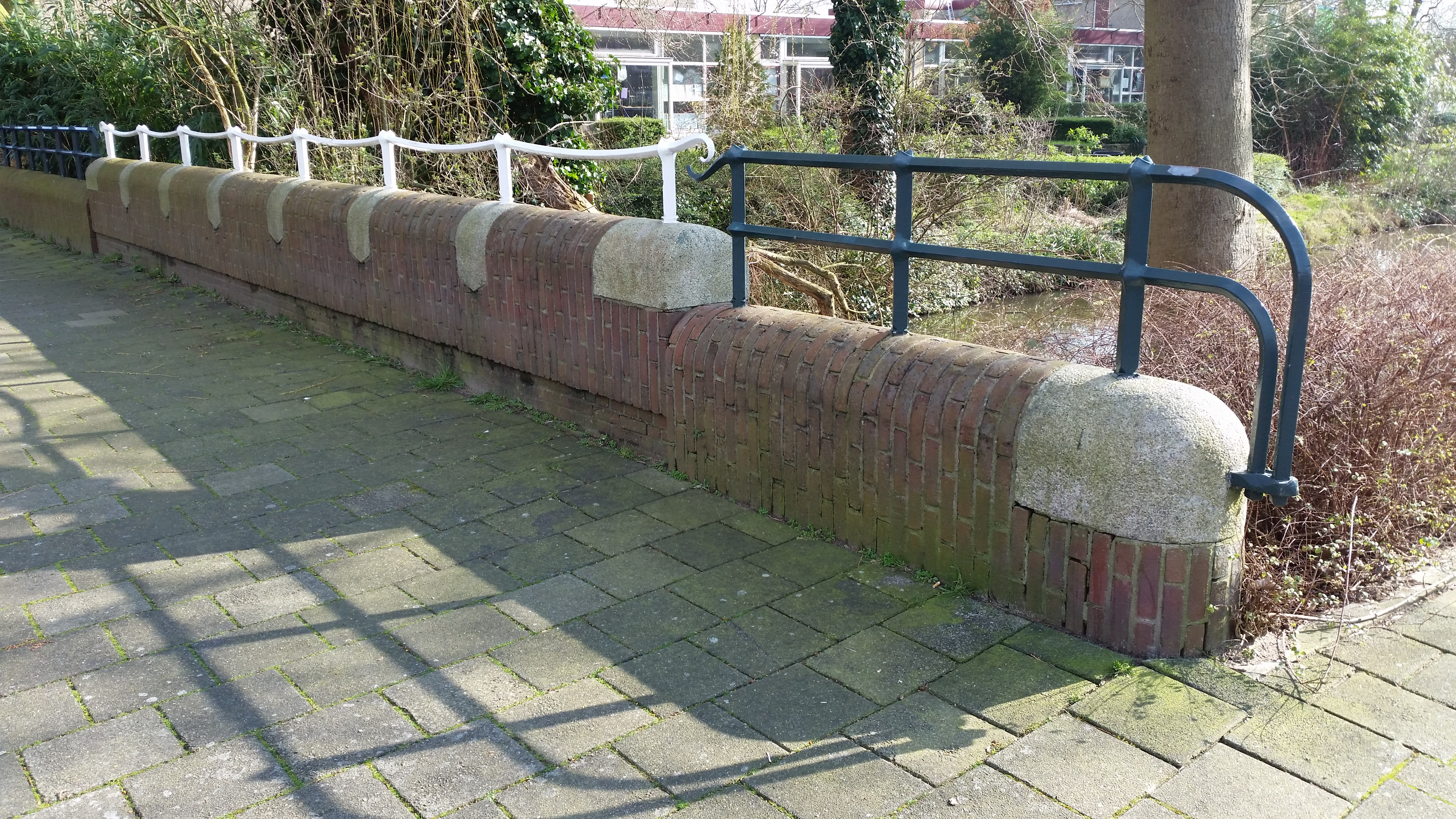 Impressie van brug 338 in de Johannes van der Waalsstraat in Watergraafsmeer in Amsterdam-Oost. Ontwerp Piet Kramer